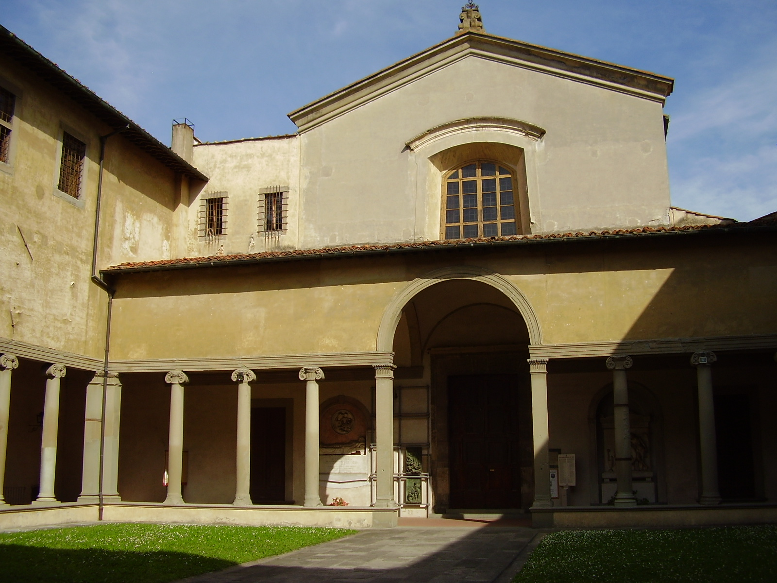 Santa Maria Maddalena de' Pazzi, Firenze church facade in Florence, Italy